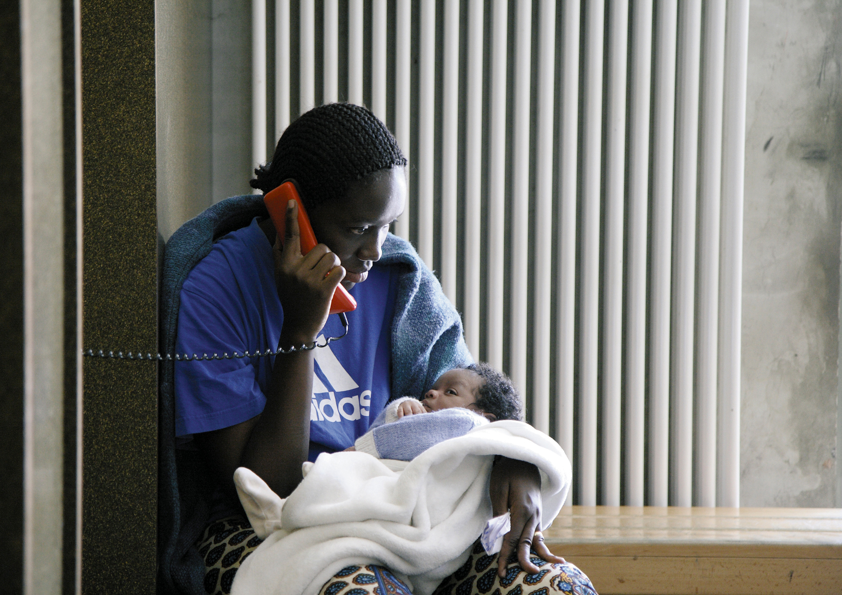 Requérante d’asile dans le du centre d’enregistrement et de procédure de Vallorbe. Image tirée du film « La forteresse » de Fernand Melgar